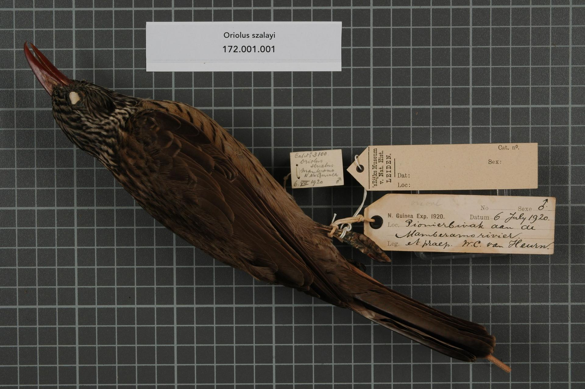 Oriolus szalayi (Madarasz, 1900)